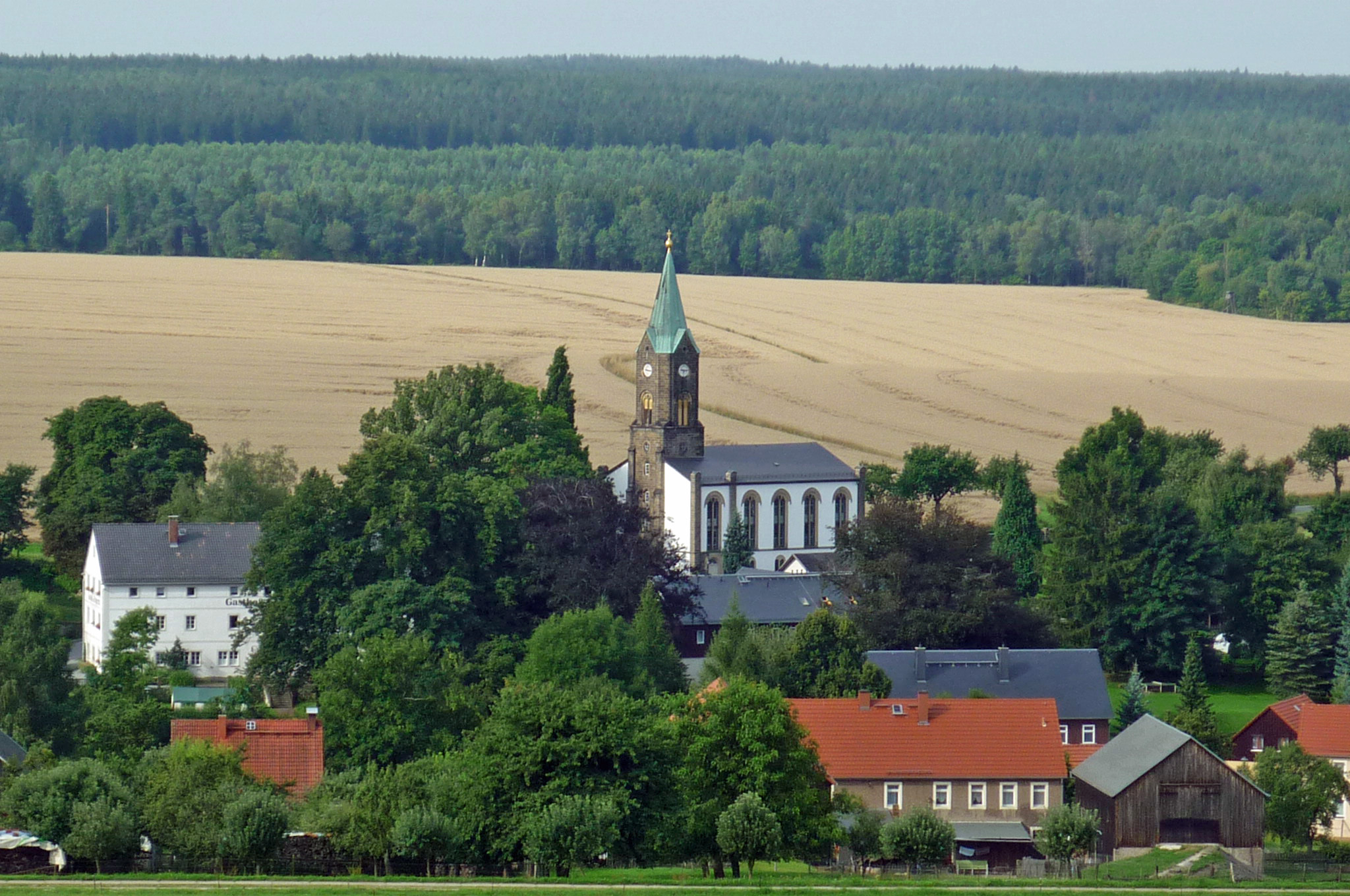 Blick auf Rosenthal